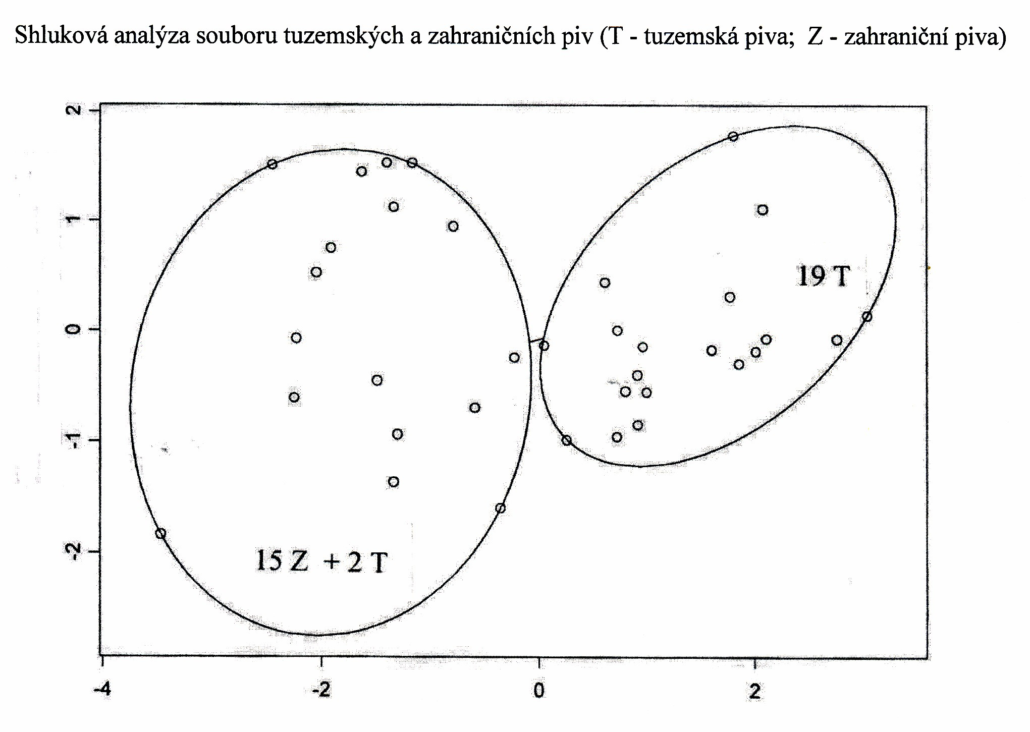 Shluková analýza souboru tuzemských a zahraničních piv